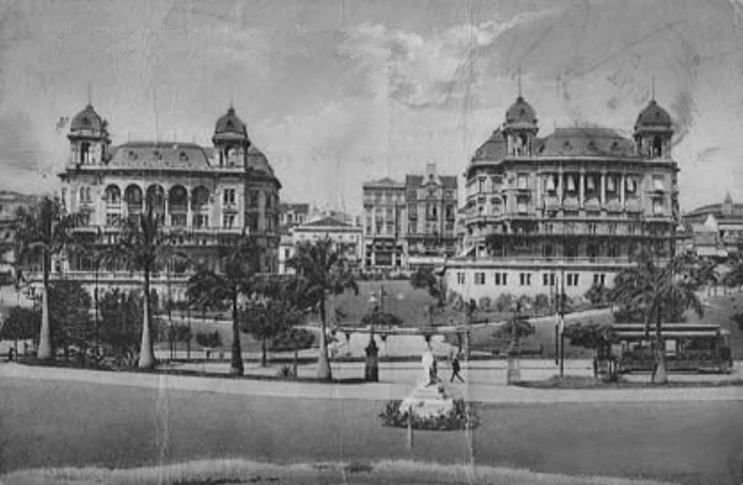 Anhangabau São Paulo